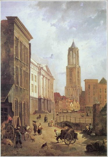 Utrecht stadhuisbrug met stadhuis en domtoren